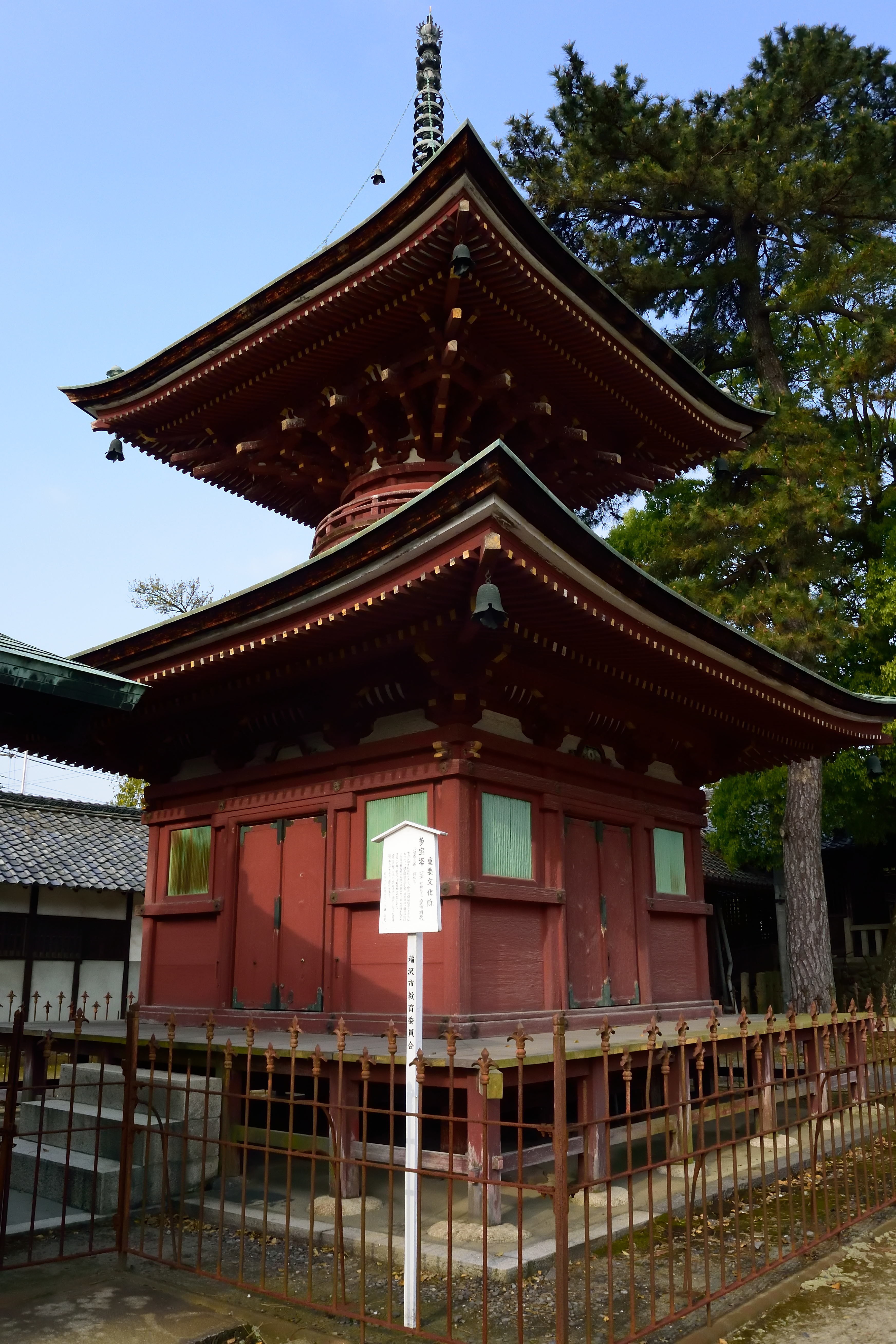 性海寺(稲沢市)多宝塔